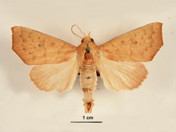 Anomis planalis male, dorsal view